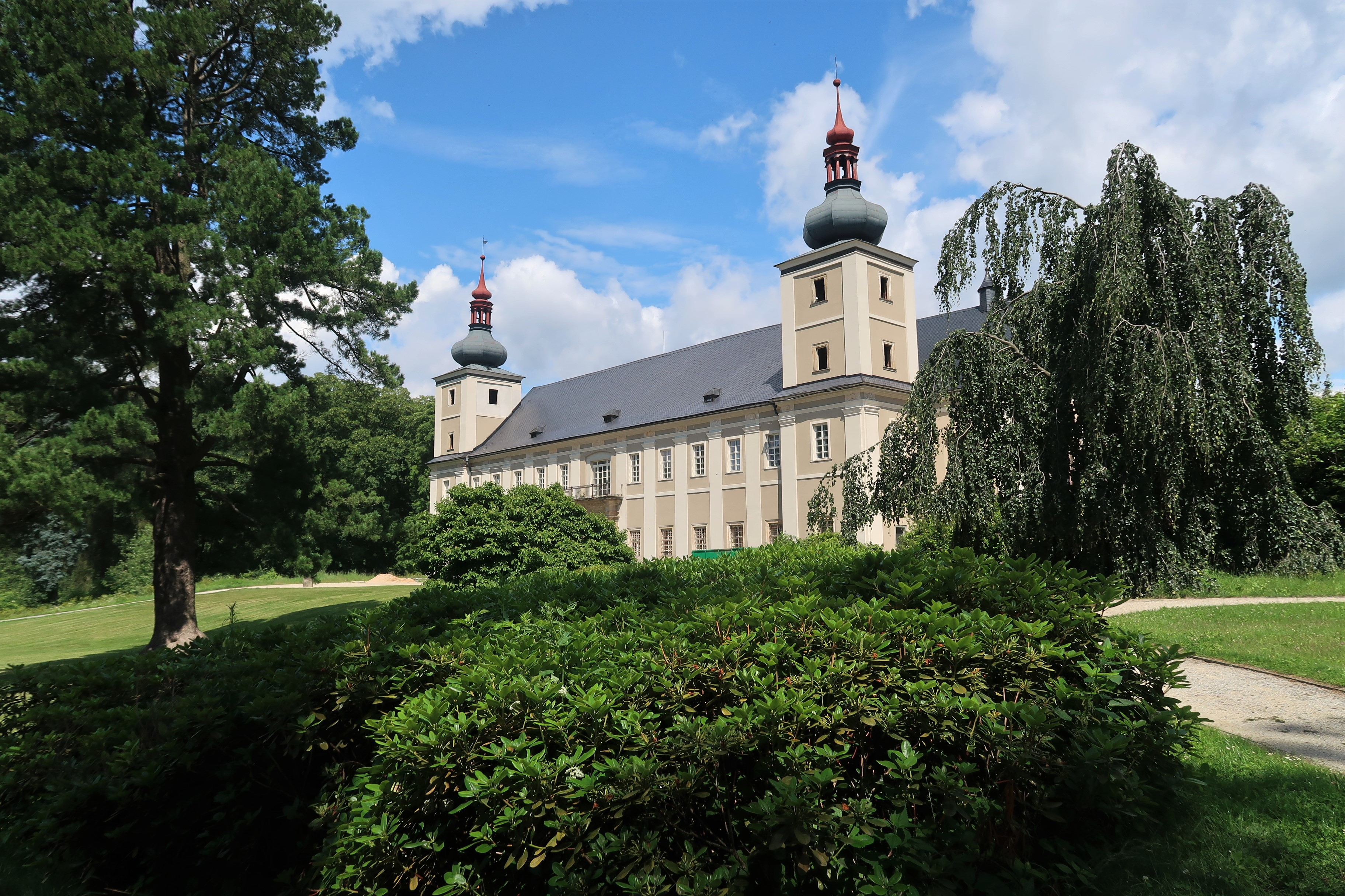 Celkový pohled na zámek z parku